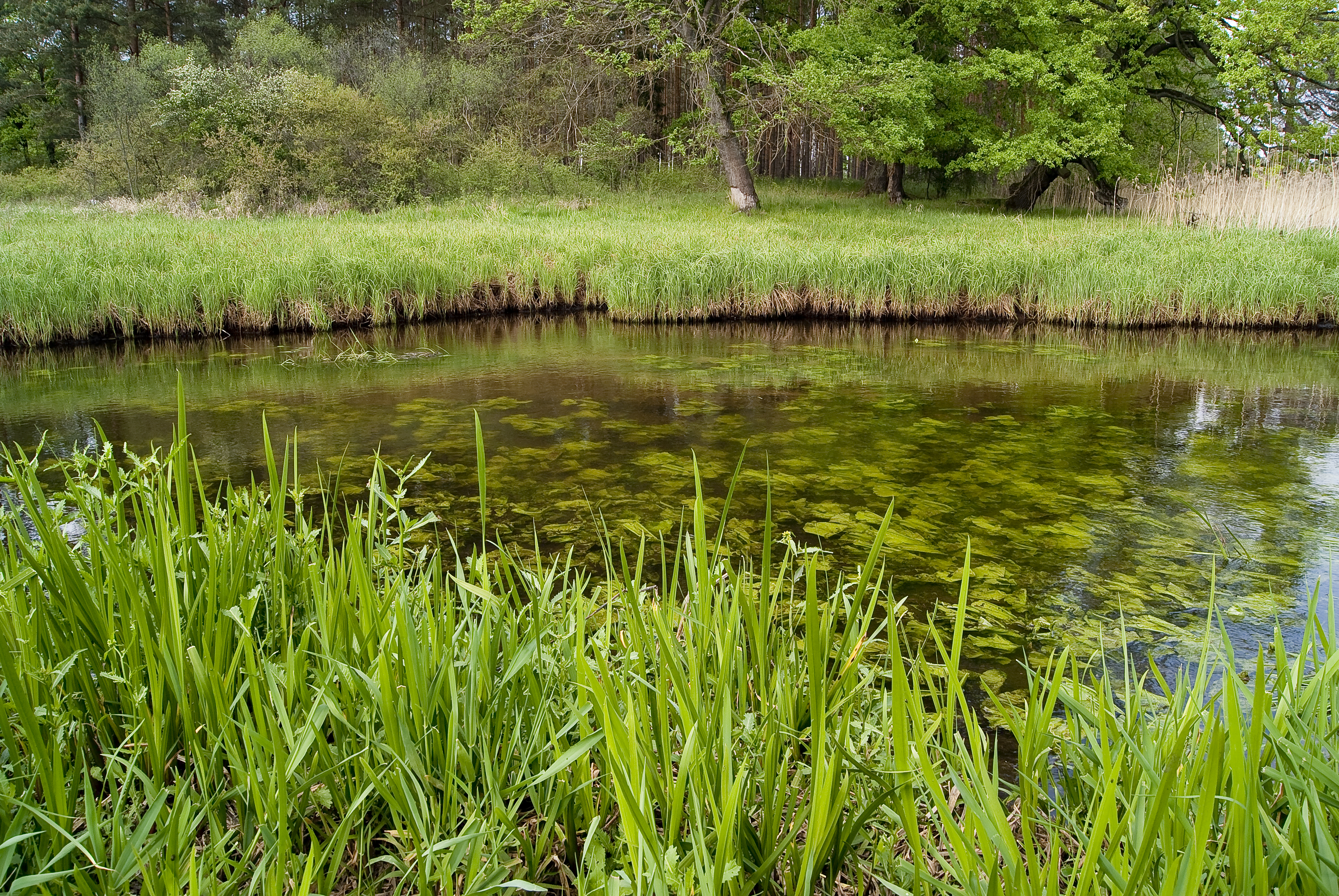 Gryżyński Potok, Gryżynka - niewielka rzeka w zachodniej części Polski, w województwie lubuskim, prawy dopływ Odry, okolice Szklarki Radnickiej, wiosna 2012 roku.